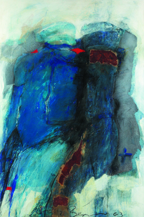 Malerei mit dem Titel "Begegnungen 2" des Künstlers Lutz Bernsau